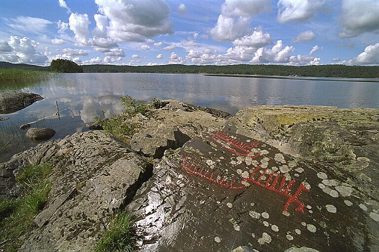 RAÄ-nummer Tisselskog 15:1. Högsbyns hällristningar, sydligaste delen, vid sjön Råvarpen. Motiv: Tisselskog 15:1 Nyckelord: Raä-Fastigheter, Riksintressen Kategori: Hällristning RAÄ-nummer Tisselskog 15:1. Högsbyns hällristningar, sydligaste delen, vid sjön Råvarpen. Tisselskog 15:1.